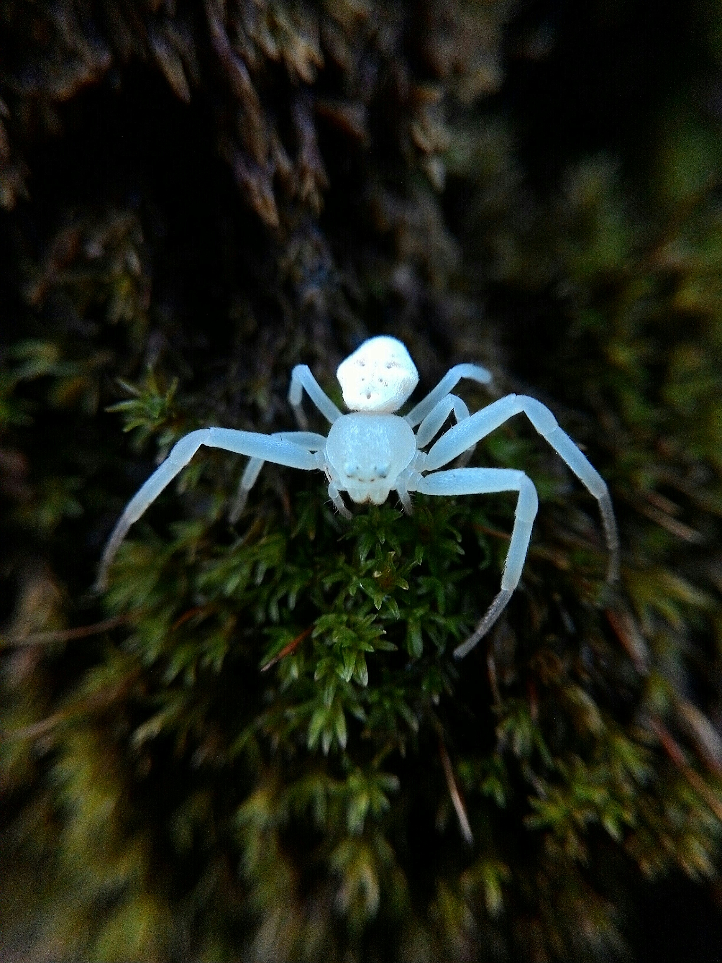 Laba-laba ini biasa ditemukan di balik daun atau di bunga yang memiliki warna sama dengan tubuhnya, ukurannya sangat kecil sekitar 0,5 cm, warnanya putih albino. Crab Spider cepat dan pandai bersembunyi. Laba-laba ini sejenis dengan White Crab Spider lainnya.